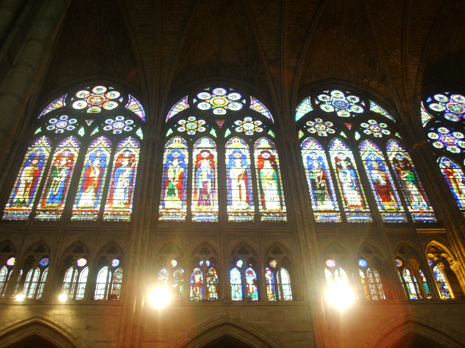 Basilica_di_saint_Denis vetrata Paris